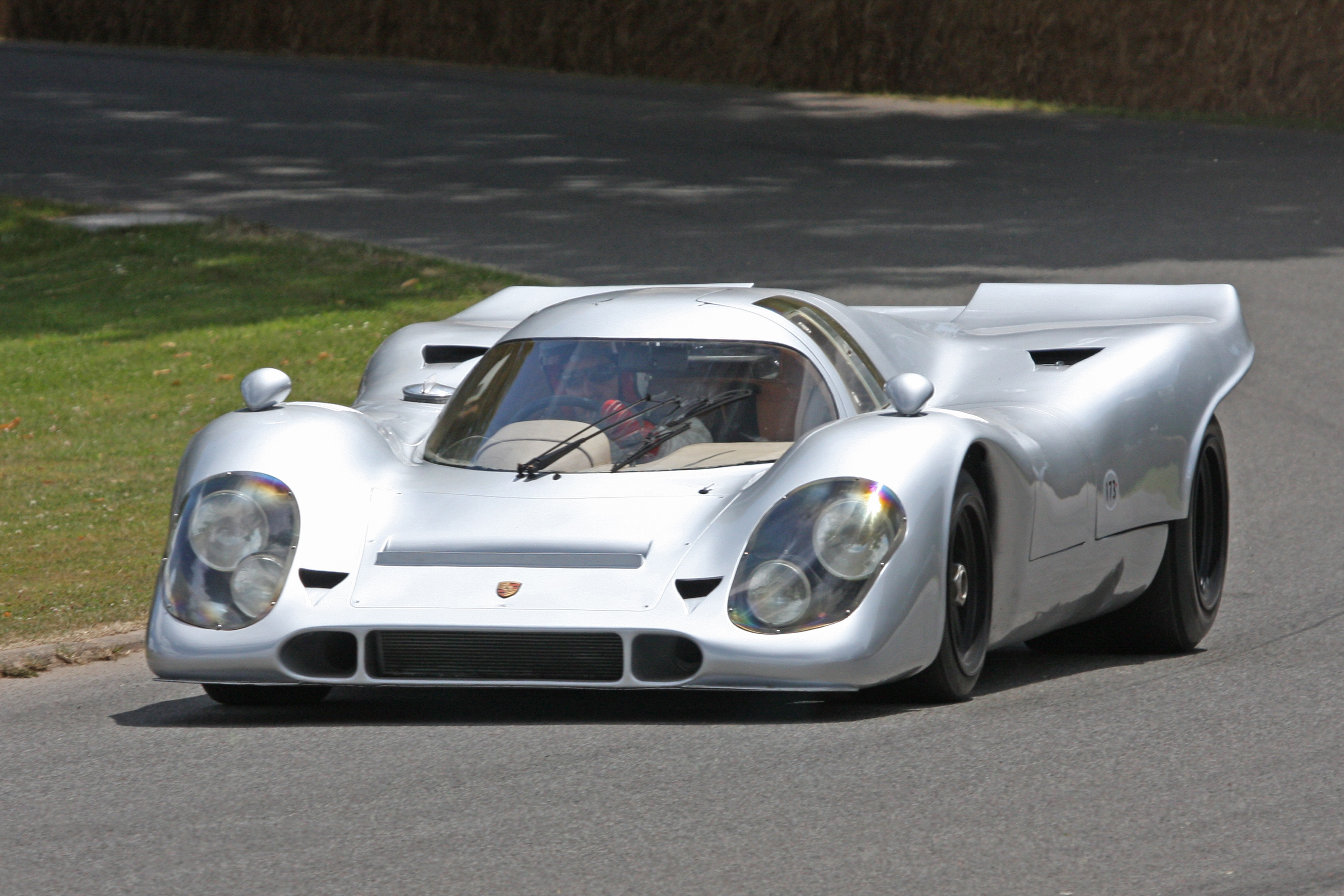 1969 Porsche 917K